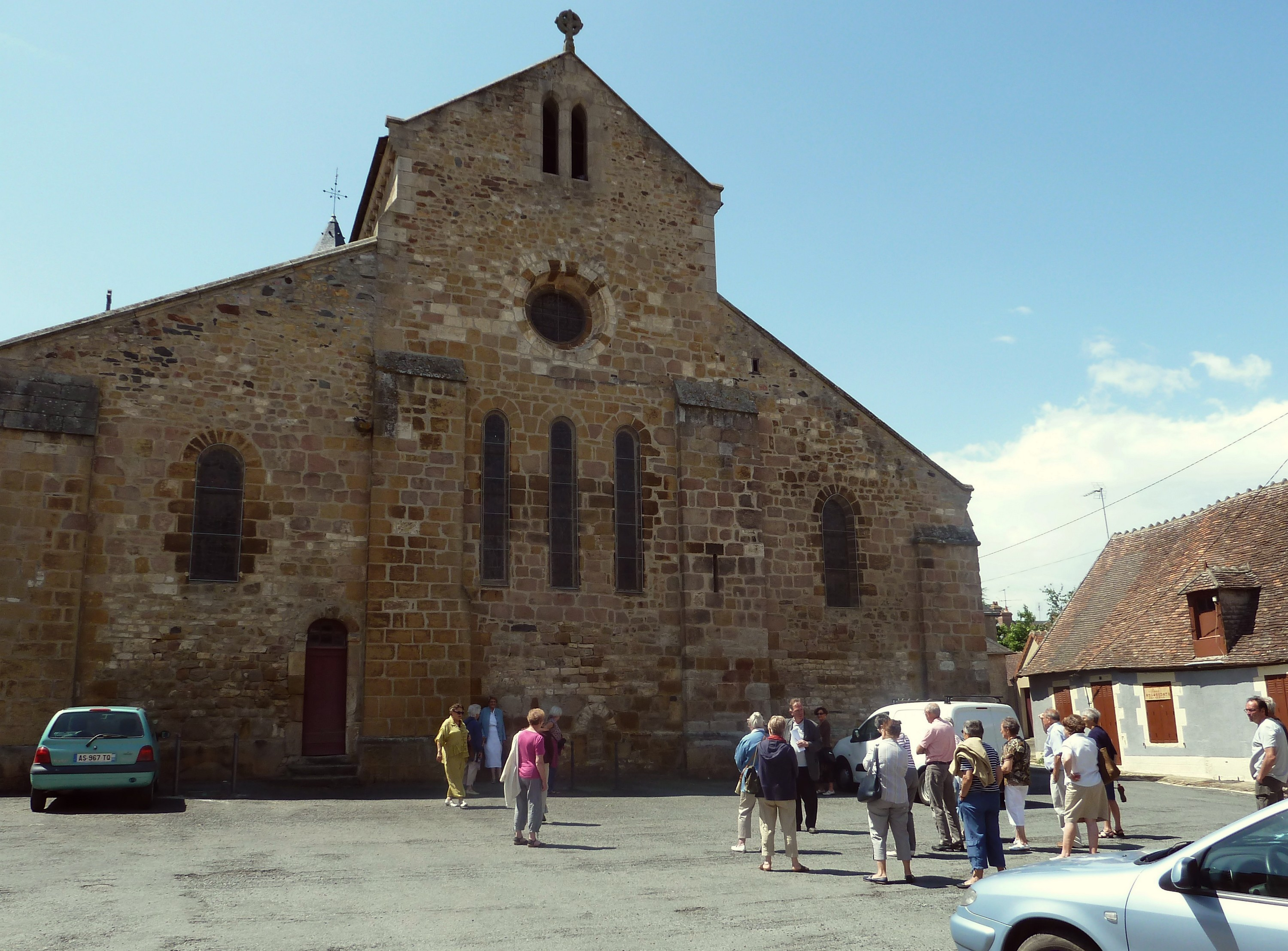 St Paxent